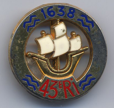 Insigne 43 RI (rouge et bleu )